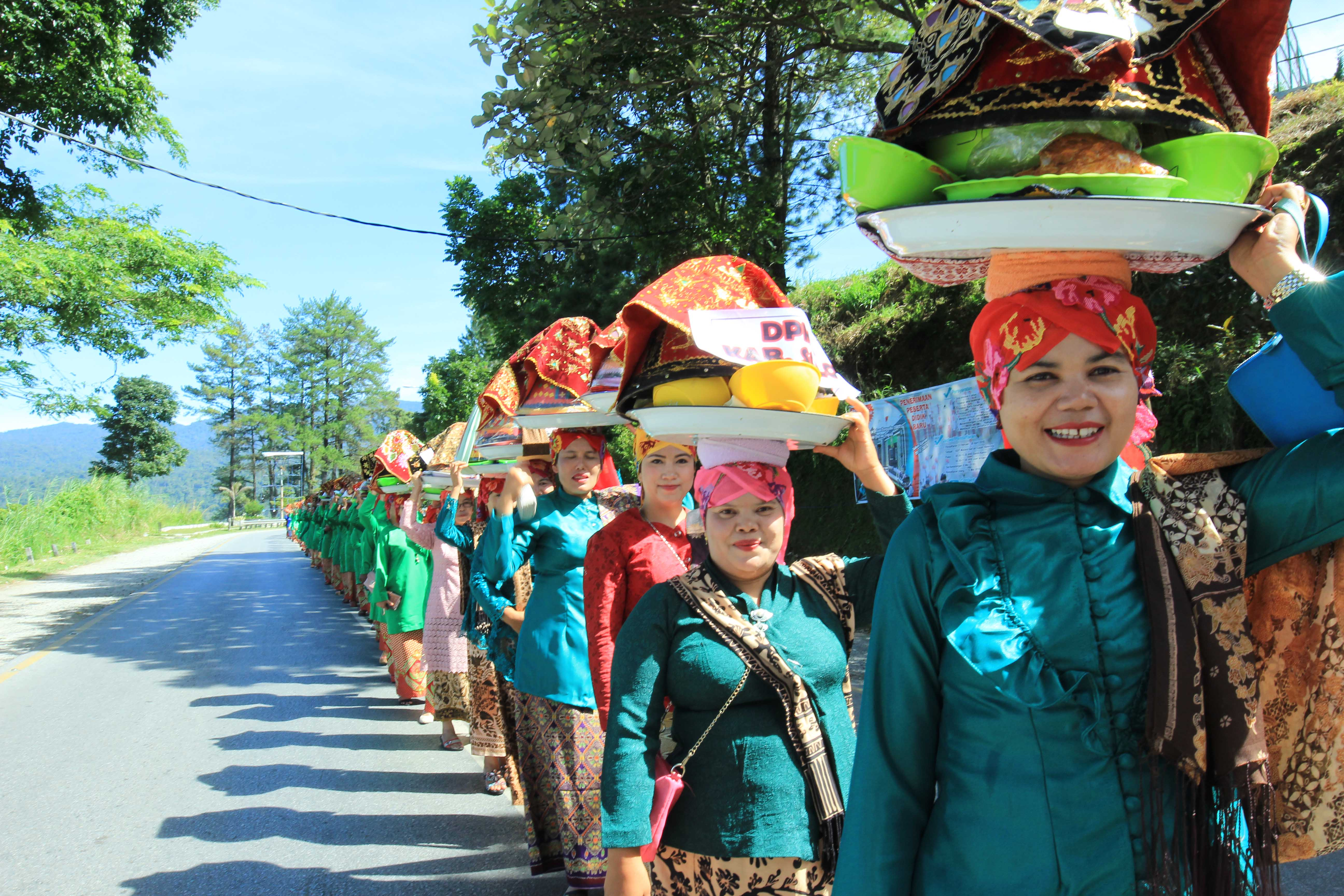 Perempuan Minangkabau membawa jamba,talam berisi makanan untuk acara adat di Arosuka Kabupaten Solok, Sumatera Barat. Arakan jamba pembawa jamba ini berjalan hingga 2 kilometer.Jamba ini akan dimakan bersama para datuk atau tetua adat.